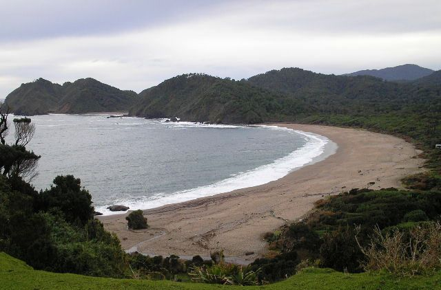 Playa de Quiutil o Colecole en la costa occidental de la Isla Grande de Chiloé